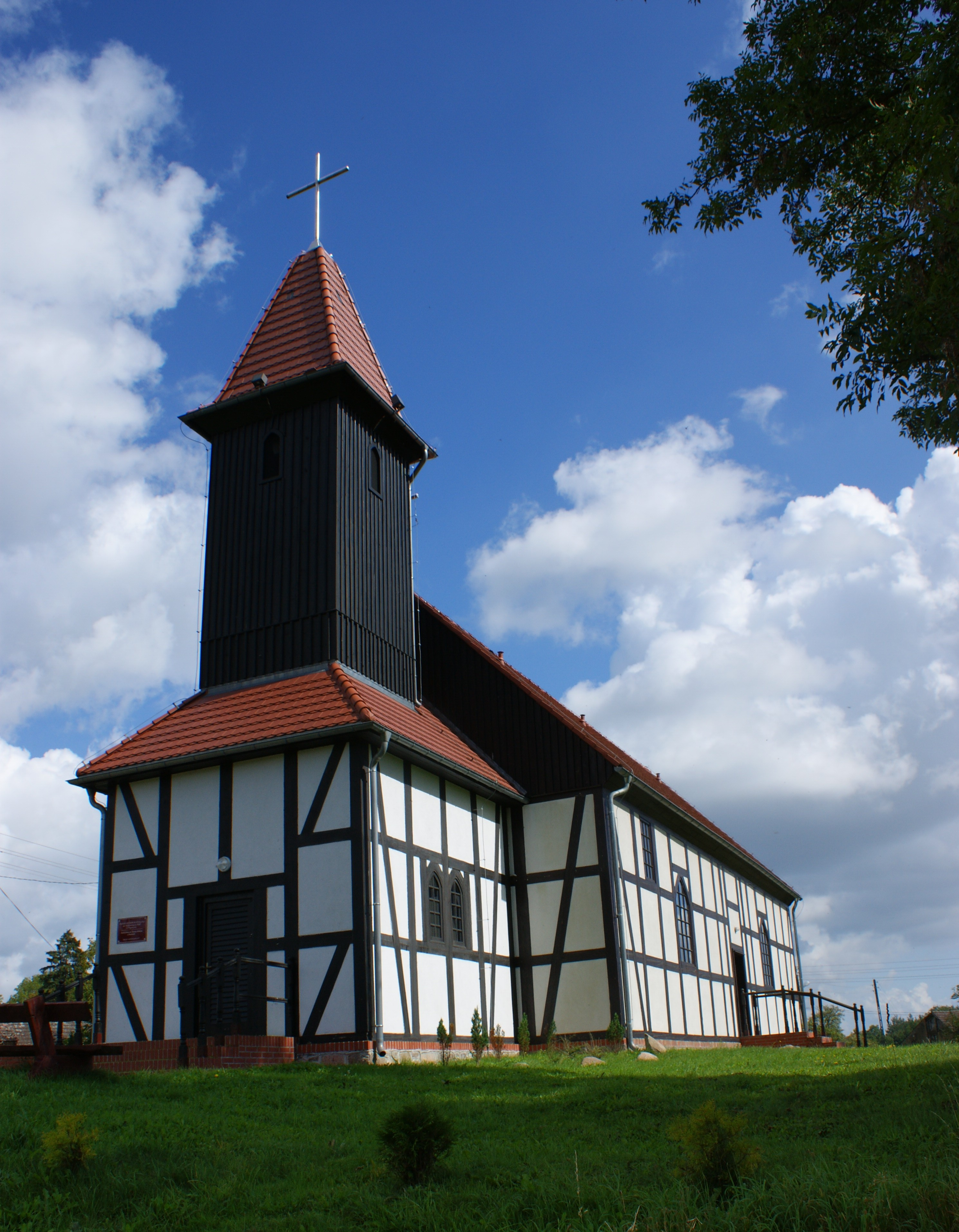 Brzeźniak - rzymskokatolicki kościół filialny (o konstrukcji ryglowej) p.w. św. Mikołaja Biskupa z XIX w